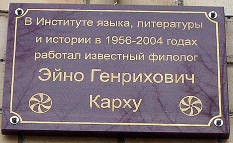 Памятная доска филологу Эйно Генриховичу Карху (1923-2008) на здании Института языка, литературы и истории Карельского научного центра РАН в Петрозаводске. Установлена 17 апреля 2018.